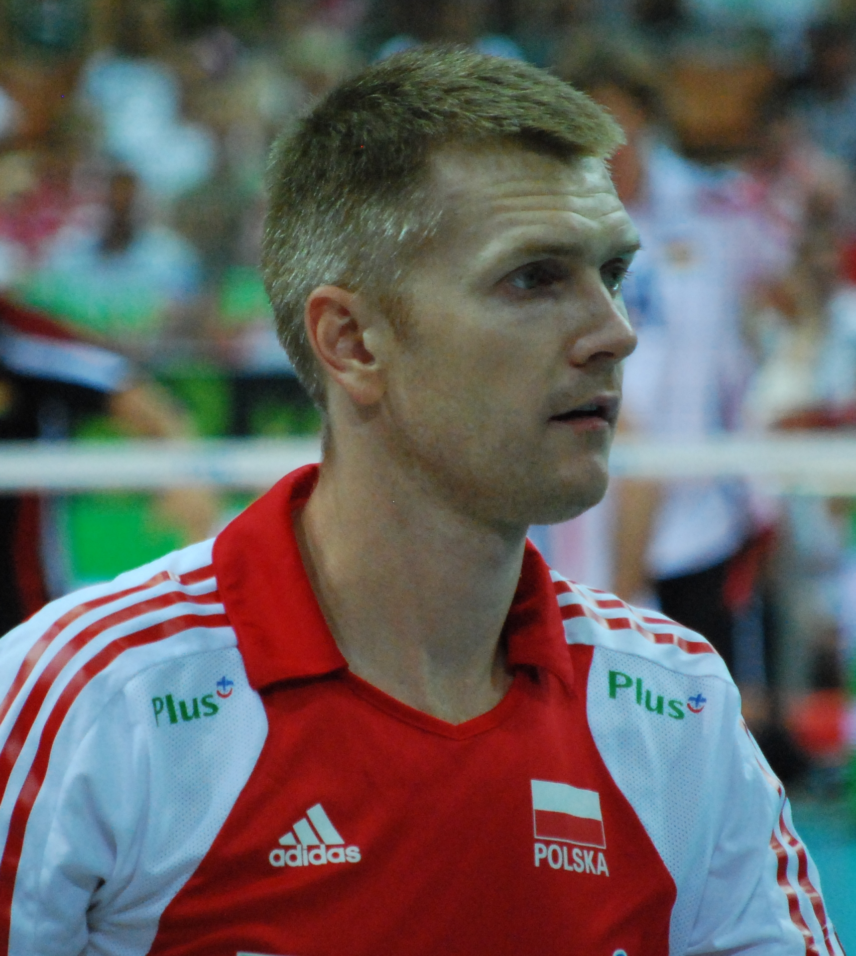 Paweł Zagumny